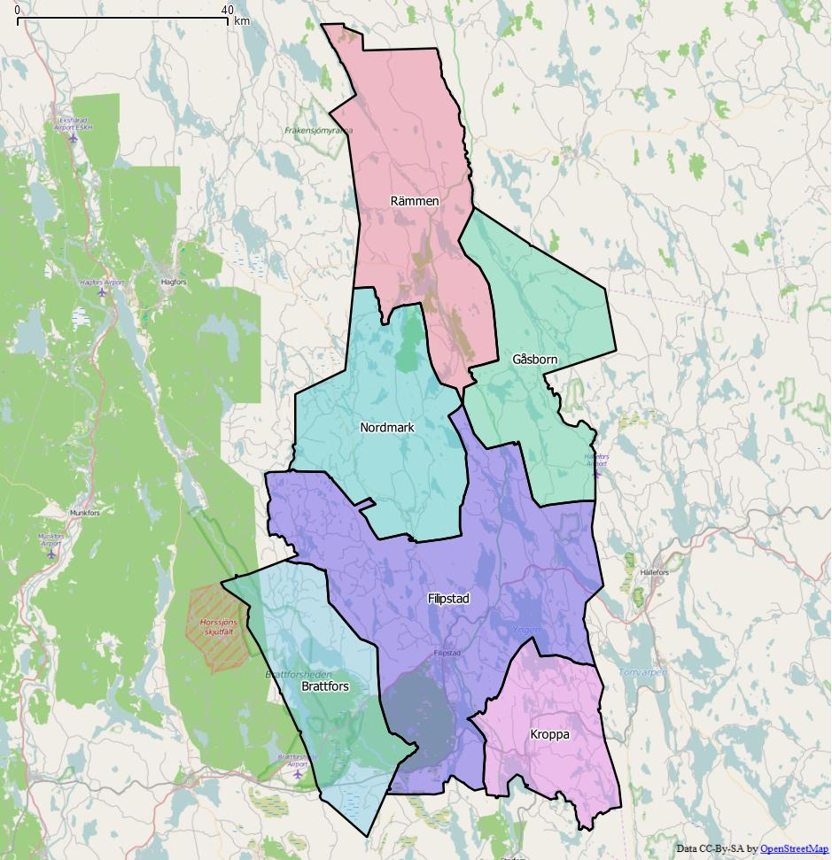 Distriktsindelningen i Filipstads kommun